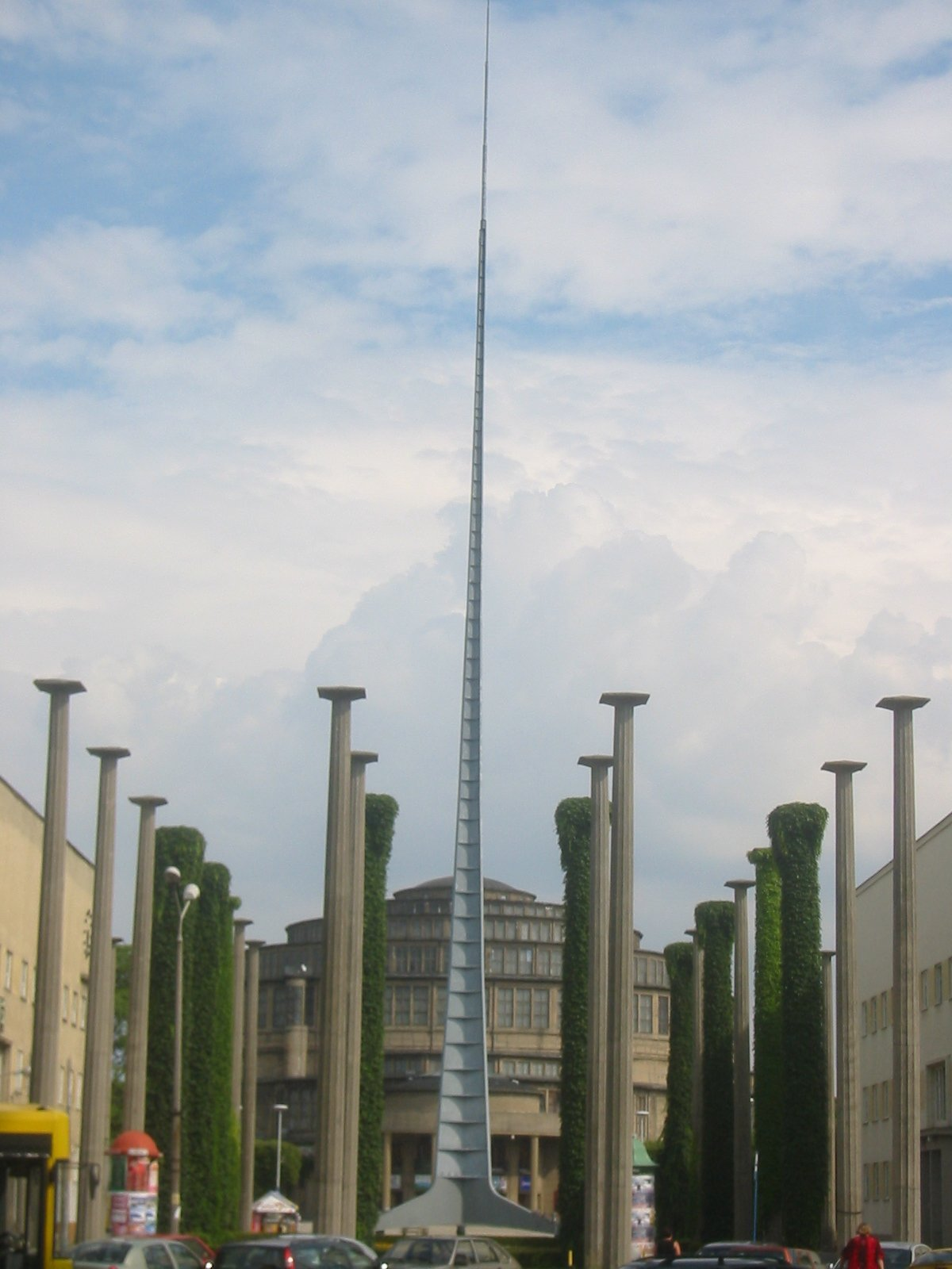 Hala Ludowa